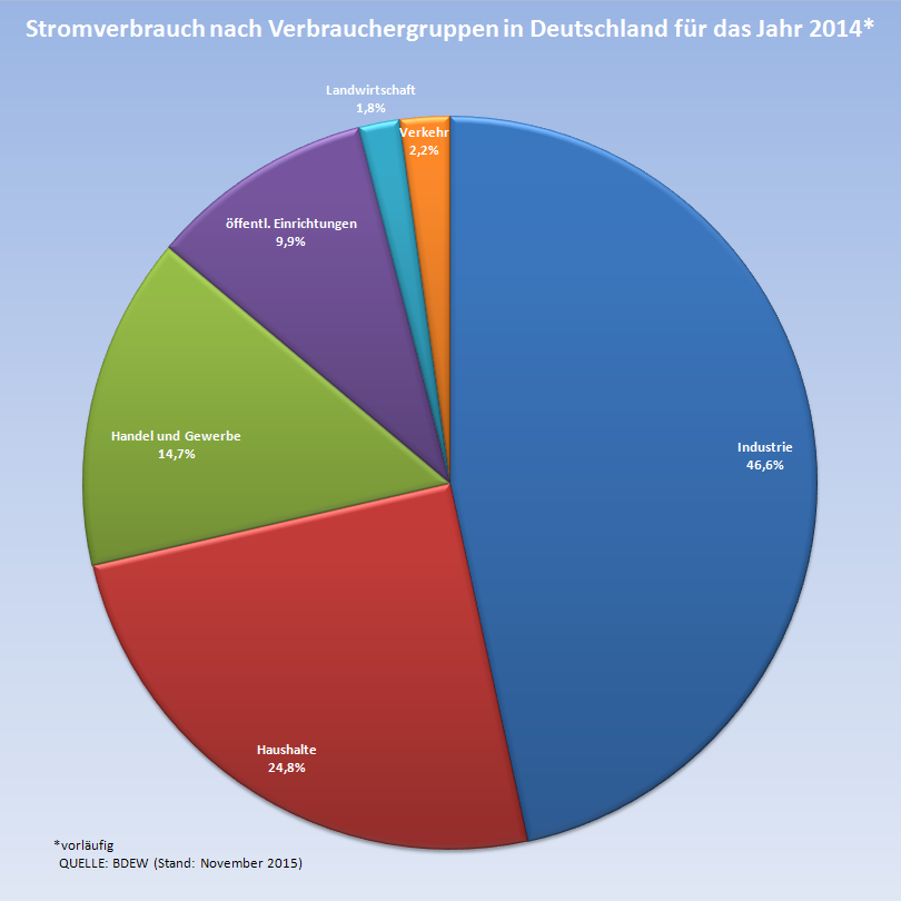 prozentualer Stromverbrauch nach Verbrauchergruppen in Deutschland für das Jahr 2014